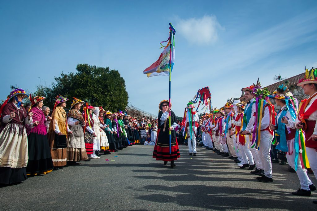 Celebración do Entroido en Samede